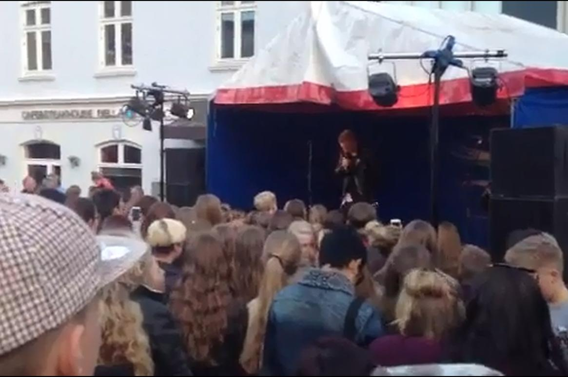 Noah spiller under Mariagerfjord Festuge på Torvet i Hadsund.